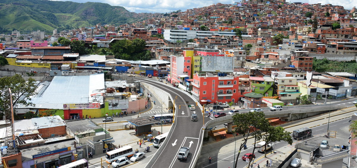 Haiman-el-troudi-soluciones-viales-elevado-presidente-medina-6-1200x565